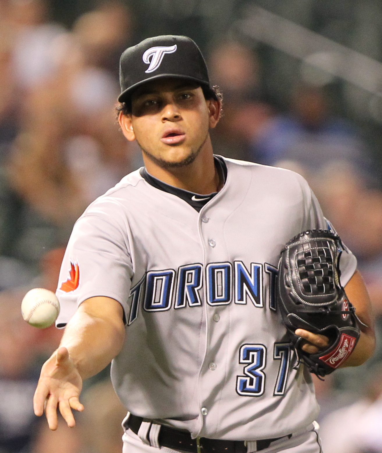 Henderson Alvarez